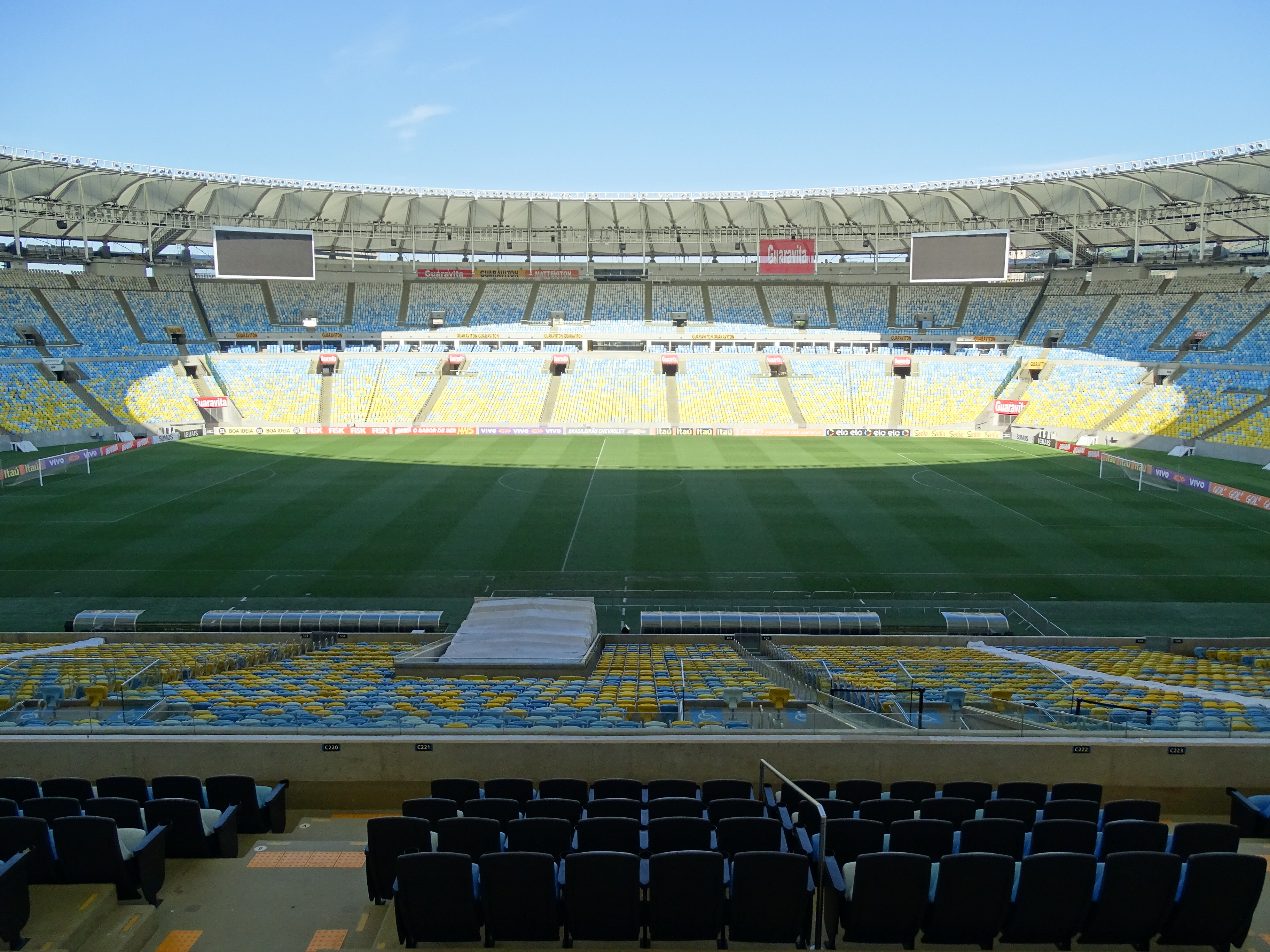 Architectural Detail - Maracana Stadium - Rio de Janeiro - Brazil - 12